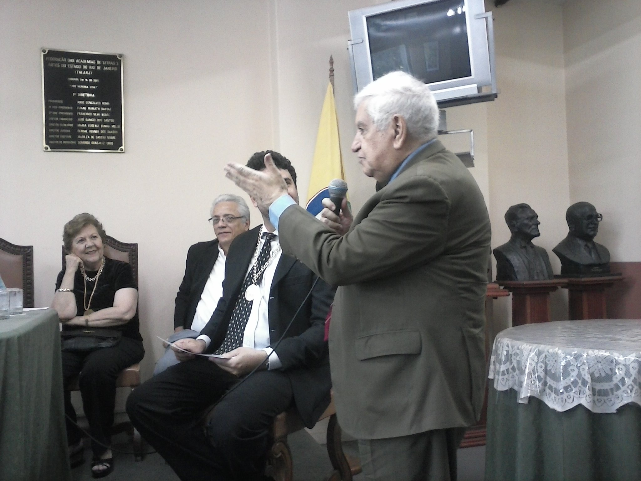 FOTO DO JUIZ FRANCISCO HORTA